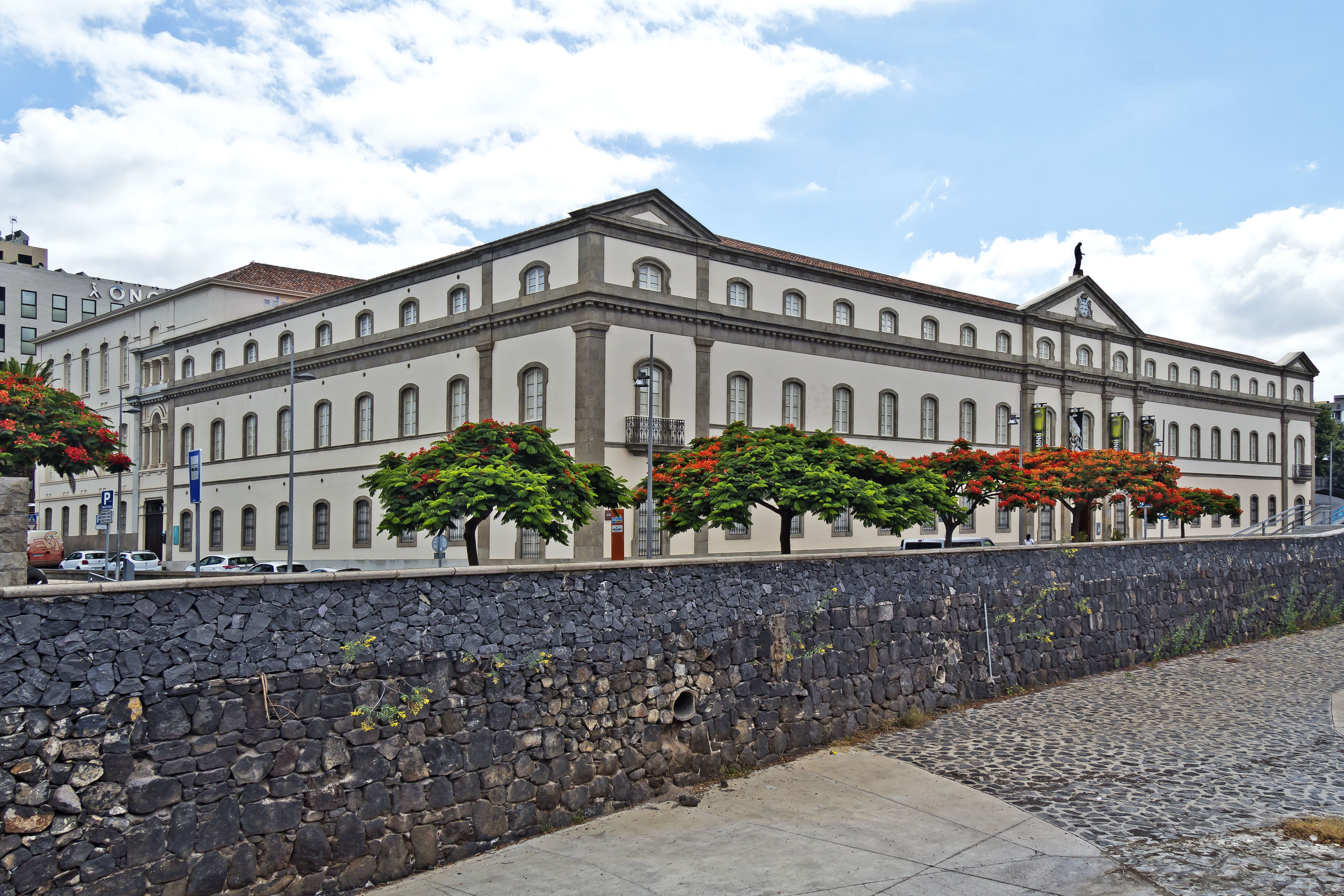 Das Gebäude wurde als „Hospital de los Desemparados“ von Manuel de Oraá entworfen. Es wurde 1895 fertiggestellt. Es wird heute als „Museo de la Naturaleza y el Hombre“ genutzt. Ansicht von Nordosten